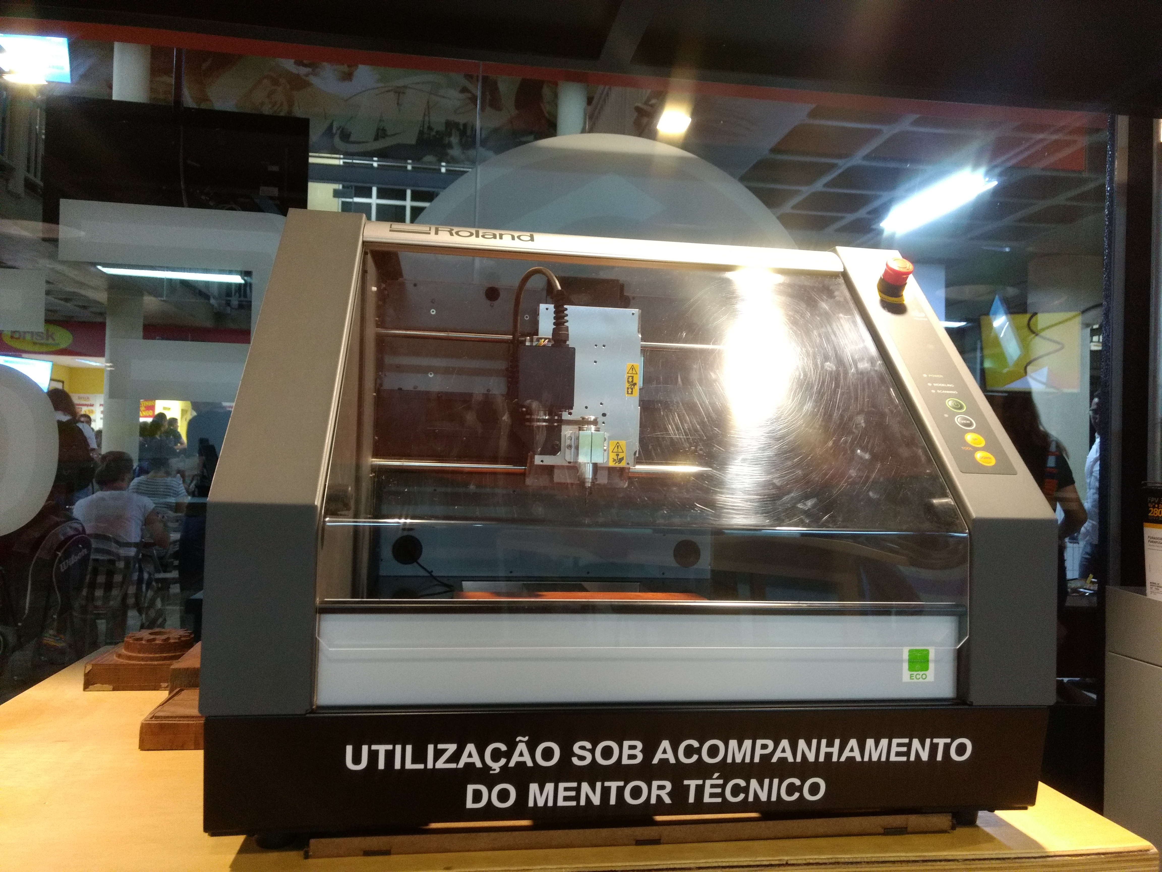 Fresadora de Precisão disponível no FabLAB Newton